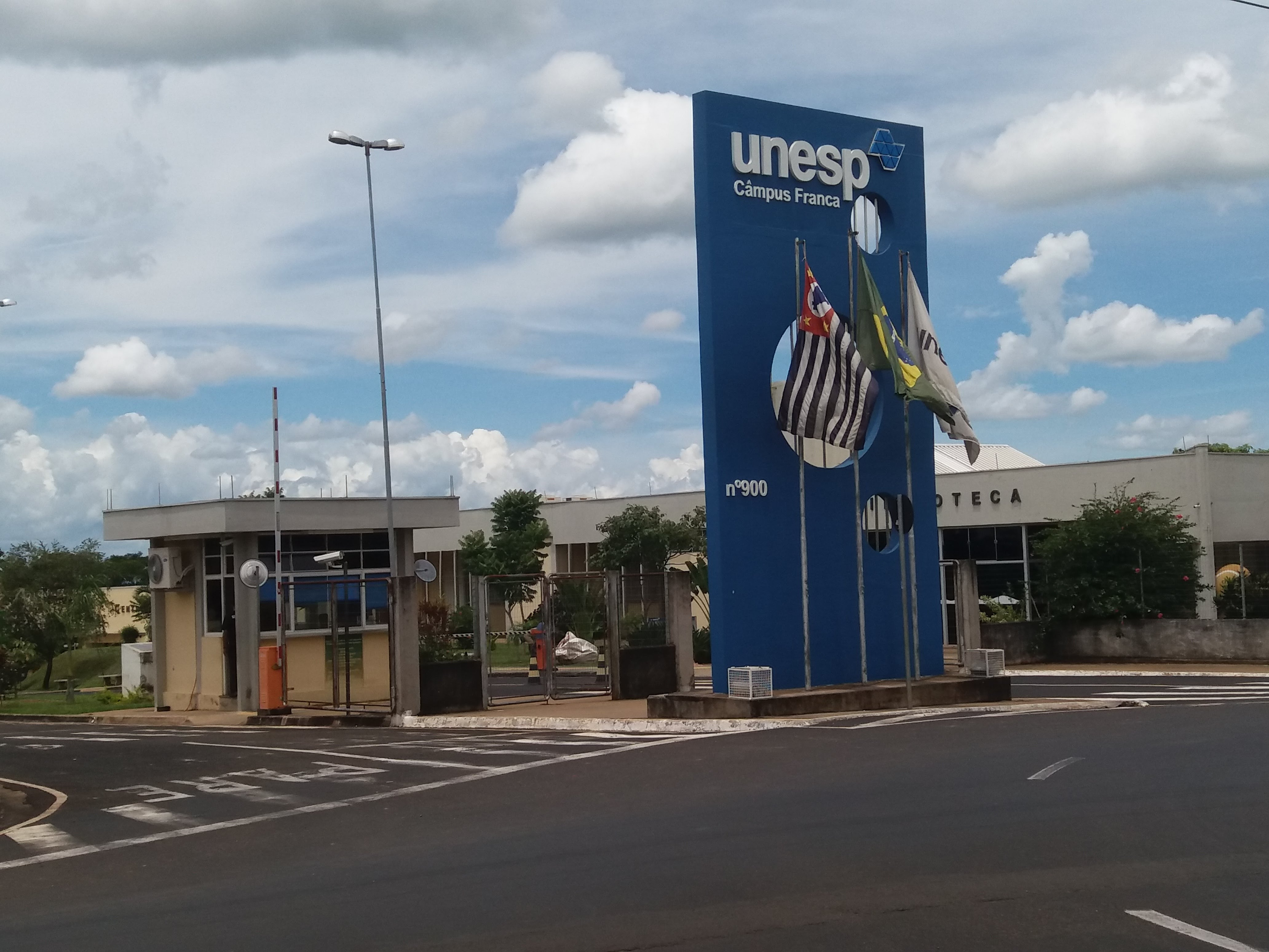 UNESP Franca (Main Entrance), Franca (SP), Brazil